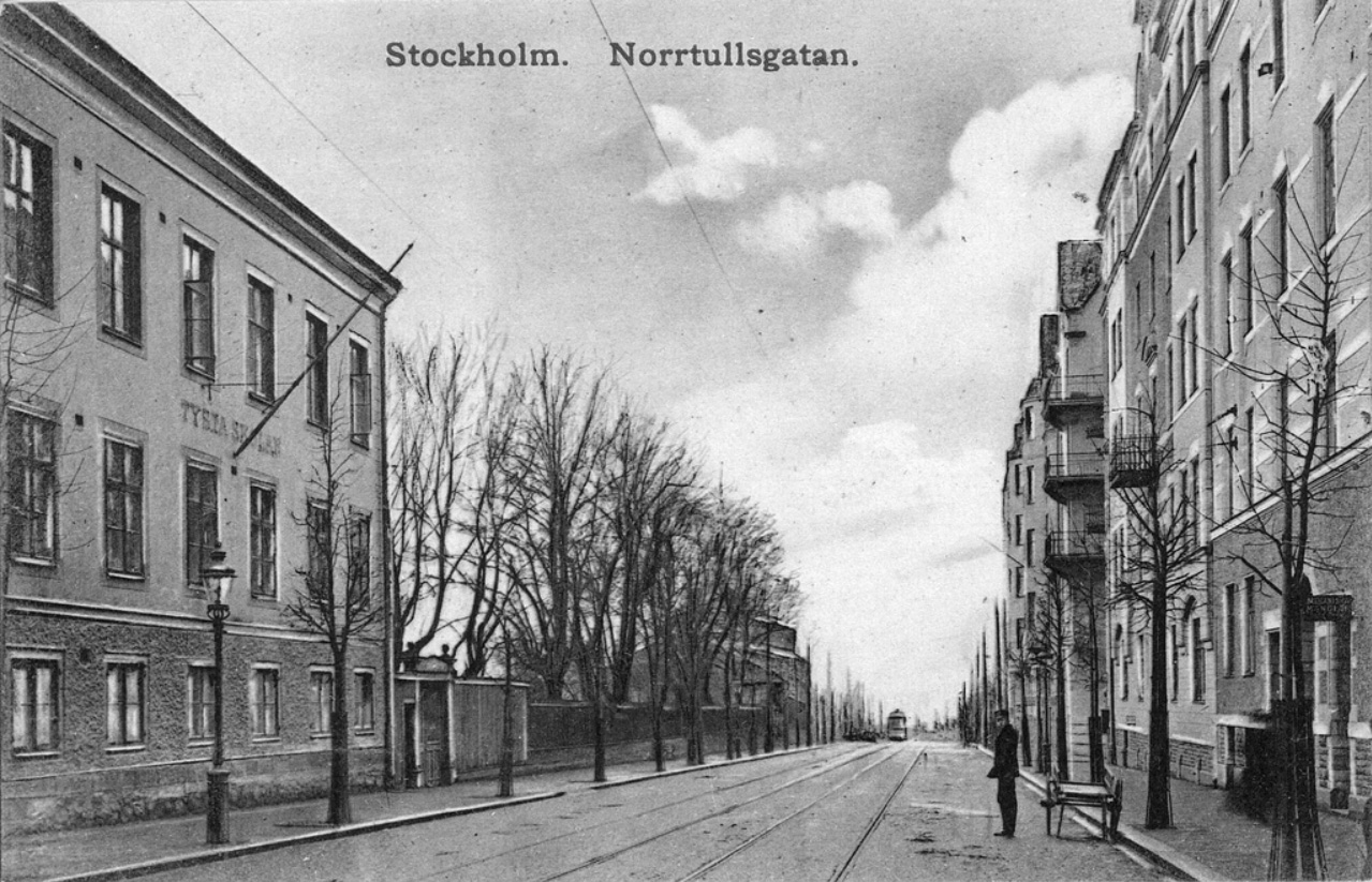 Tysta skolan, Norrtullsgatan. Rivet 1912